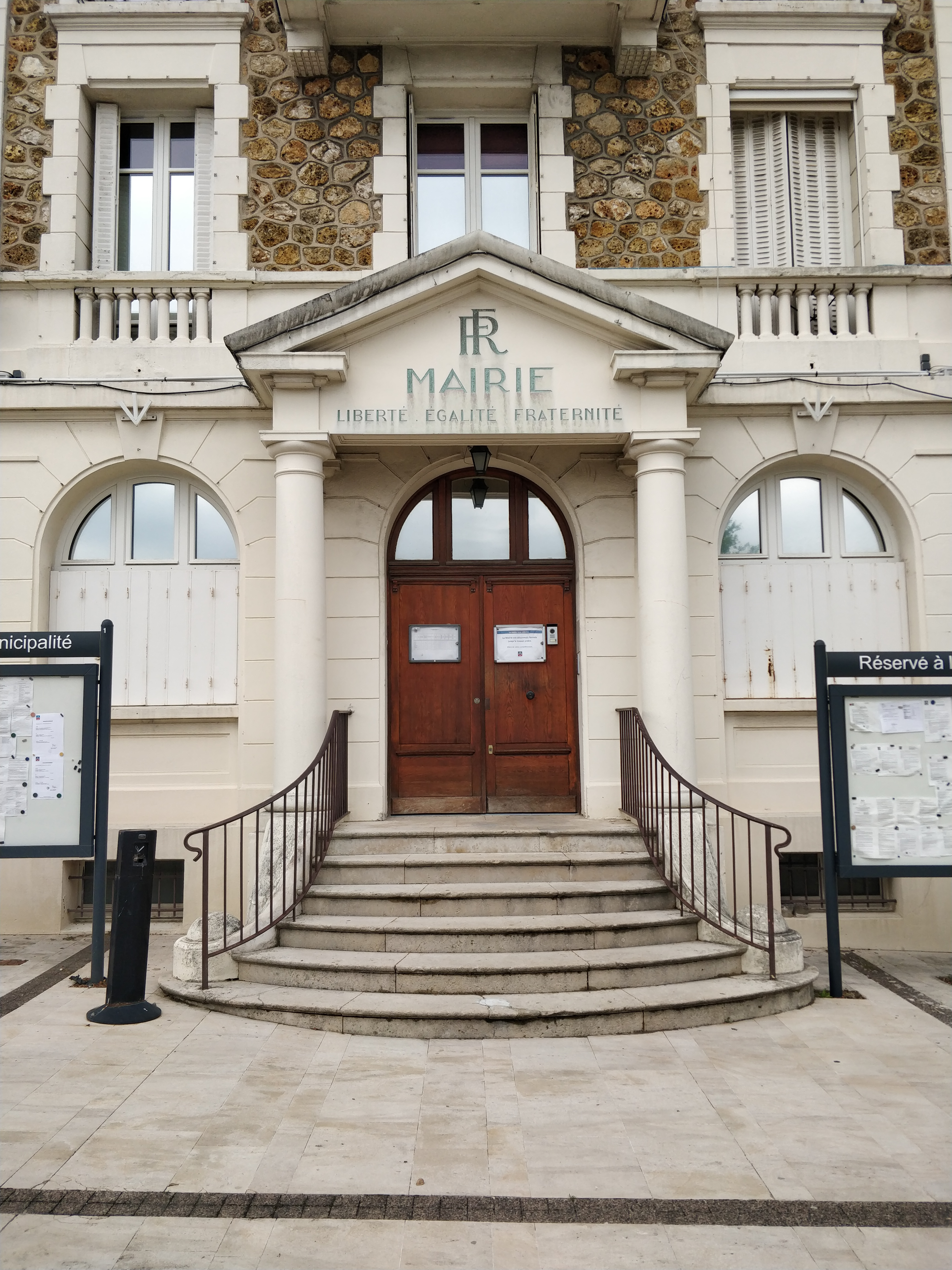 Entrée principale de la mairie de Wissous.